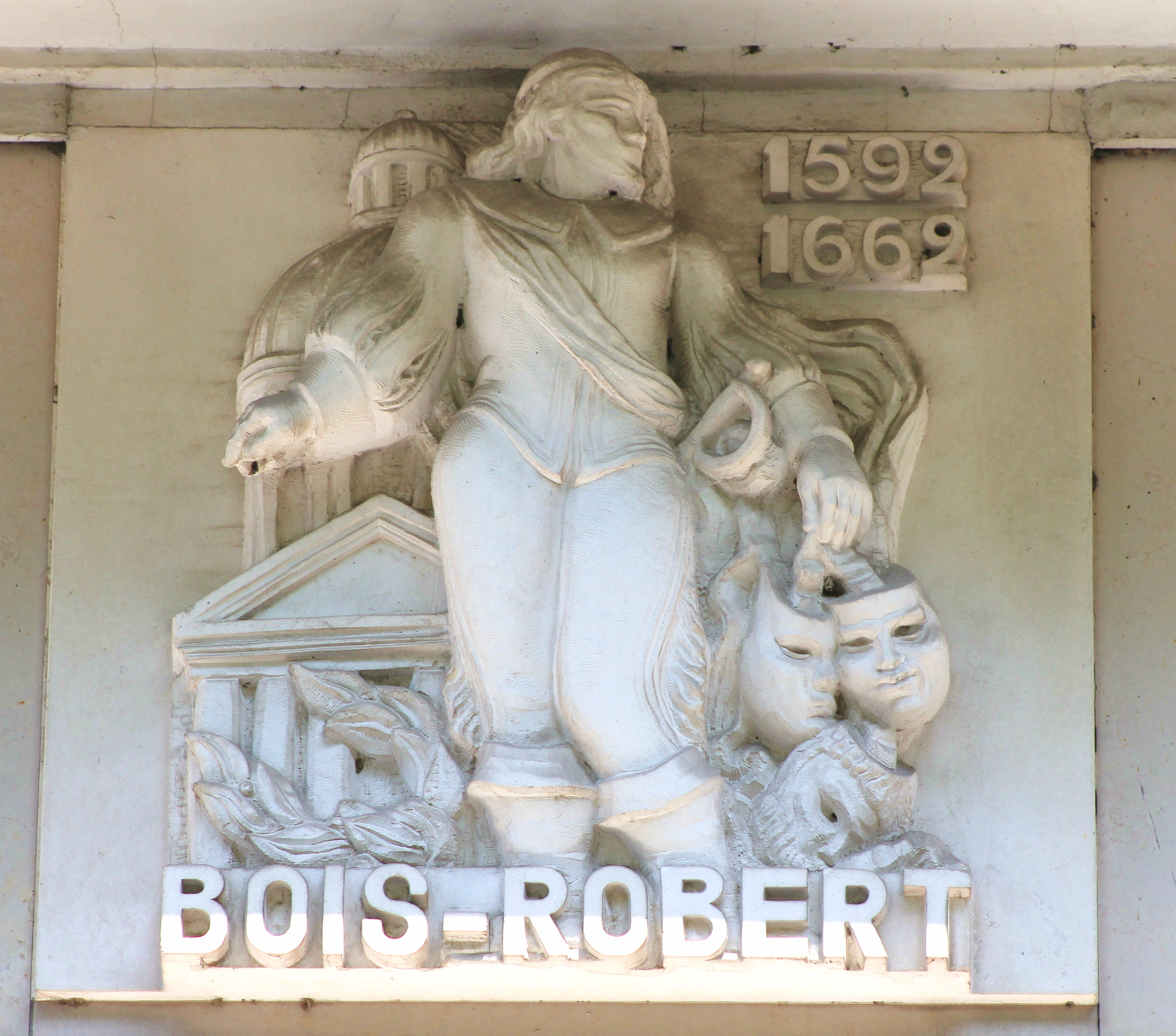 Bas-relief sur la façade de l'hôtel Malherbe à Caen (Calvados). Bois-Robert